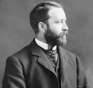 Donald Mackenzie Cameron, M.P., (Middlesex W. Ont.)